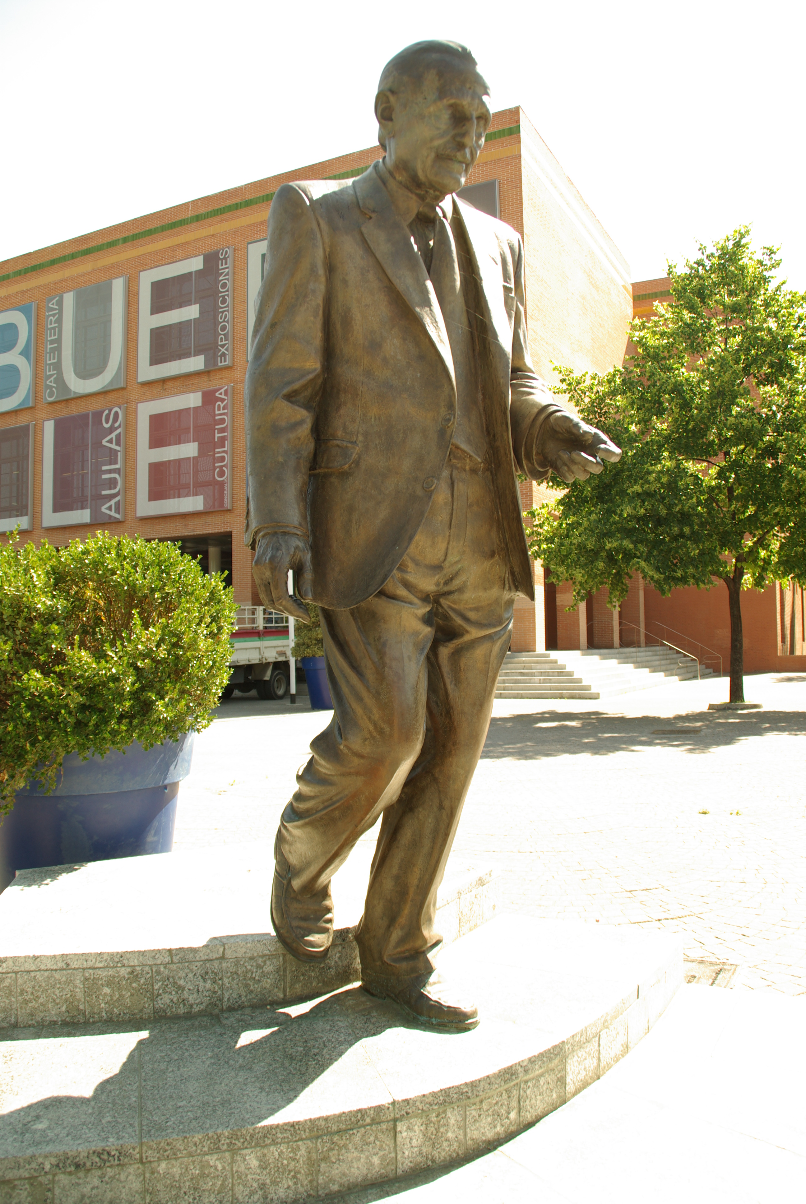 ® ALCORCON E.U.S. ANTONIO BUERO VALLEJO